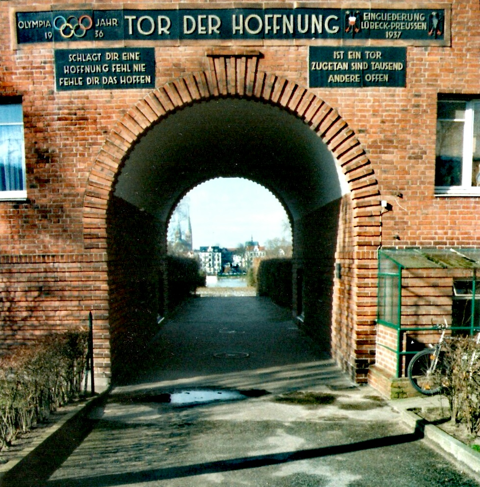 Tor der Hoffnung (Straßenansicht); Inschrift: Schlägt dir eine Hoffnung fehl nie fehle dir das Hoffen/Ist ein Tor zugetan sind tausend andere offen. Ein Zitat von Friedrich Rückert: Weisheit des Brahmanen. Ein Lehrgedicht in Bruchstücken. Band 6, Leipzig 1839, S. 98 (Nr. 57), dort Schlägt dir die Hoffnung fehl, nie fehle dir das Hoffen! Ein Thor ist zugethan, doch tausend sind noch offen.